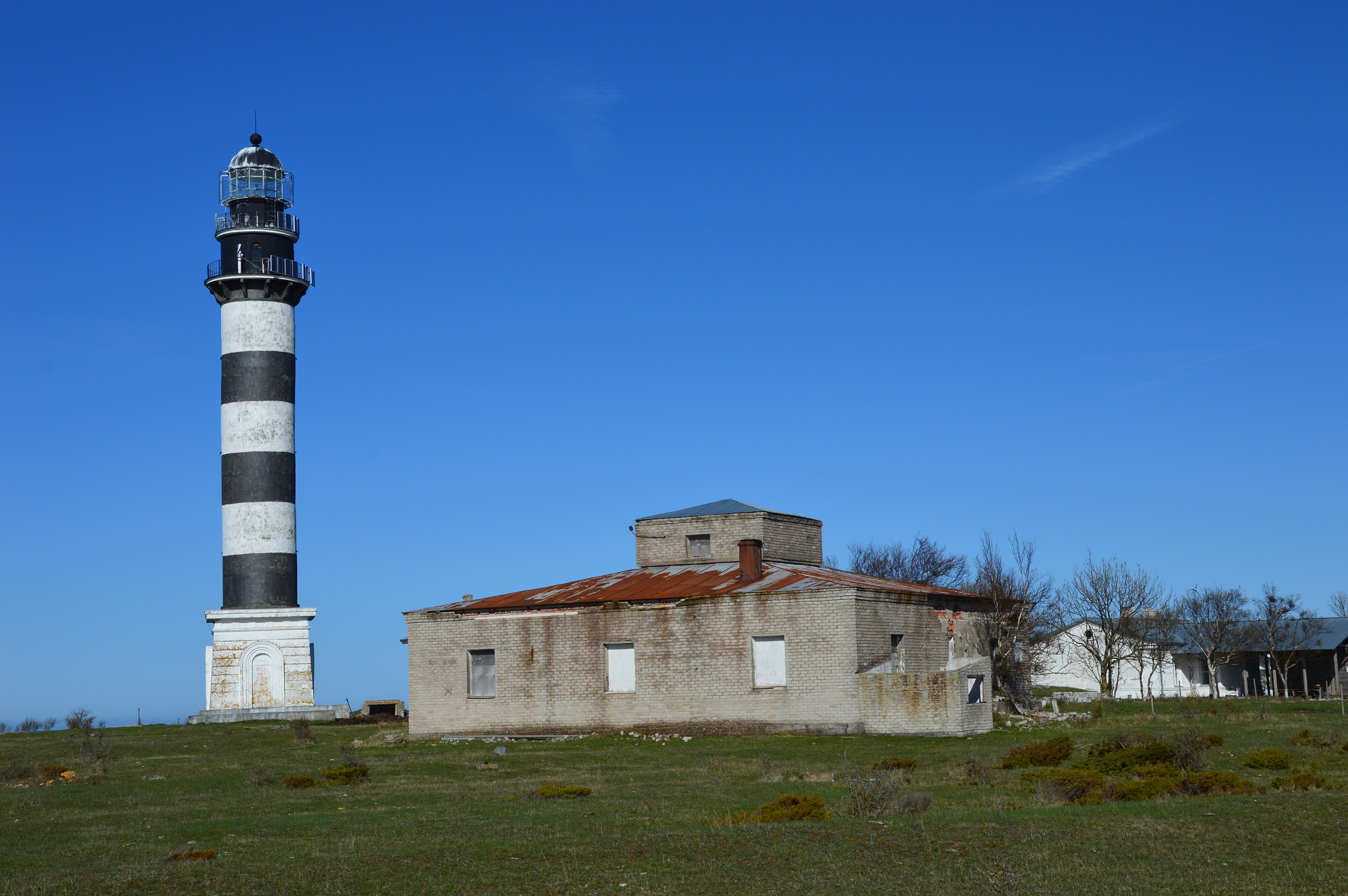 Osmussaare tuletorn.